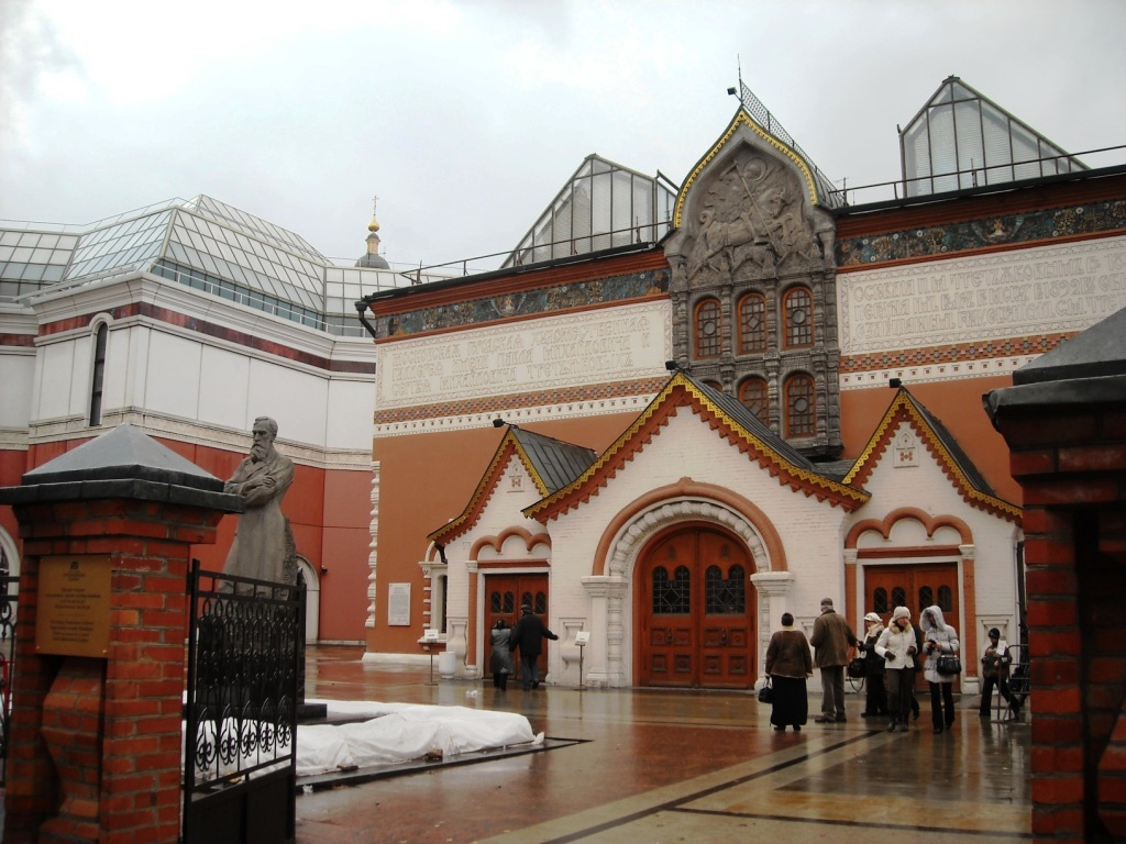 Усадьба Третьяковых (с 1893 г. — Московская городская художественная галерея П. и С. Третьяковых) (Москва и Московская область, Москва, Лаврушинский переулок, 10)